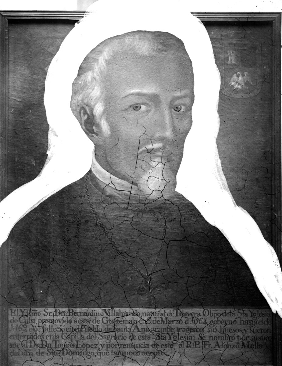 Imagen del obispo Bernardino Villalpando, quien fuese el sexto obispo de Santiago de Cuba (desde 1561 a 1564) y el segundo obispo de la diócesis de Guatemala (desde 1564 hasta su fallecimiento en 1570)